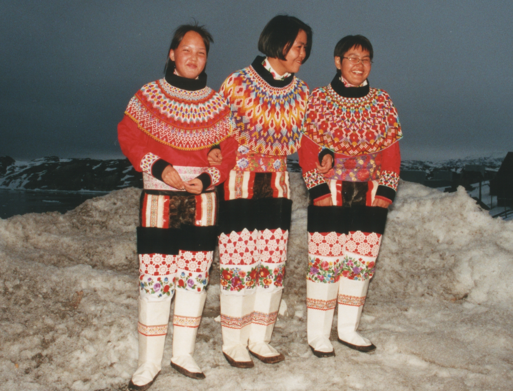 Greenland 1999